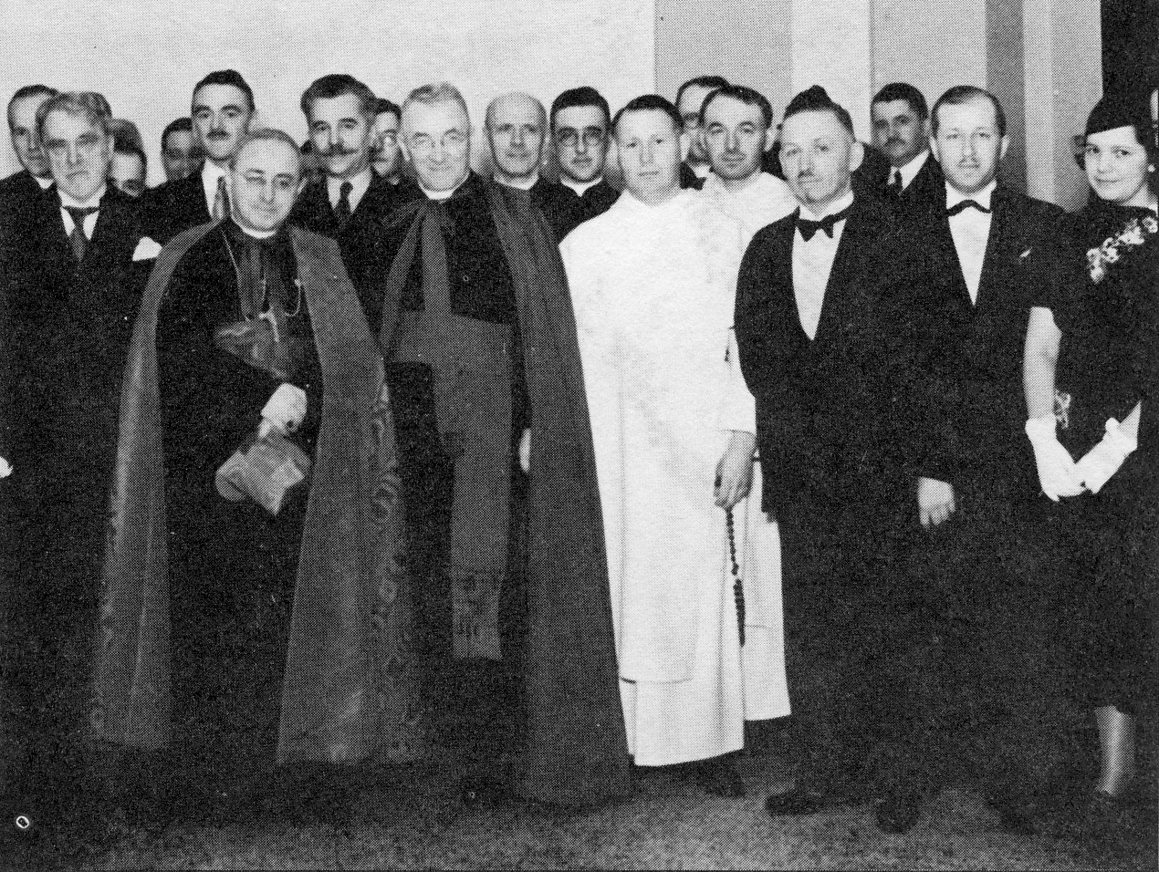 Le cardinal Villeneuve, Mgr Camille Roy, Georges-Henri Lévesque et J.-Ernest Grégoire, en 1938 au palais Montcalm à Québec, lors de l'annonce de la fondation de l'école des sciences sociales de l'université Laval